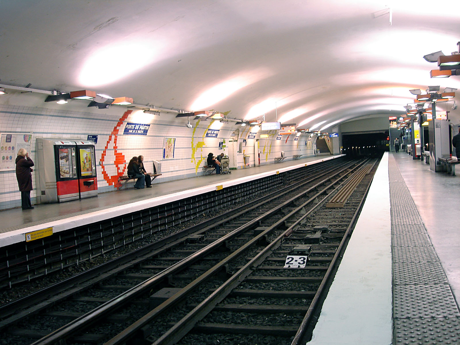 La station Porte de Pantin de la ligne 5 du métro de Paris, France.